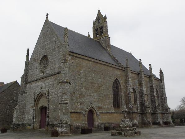 Église Notre-Dame-de-Toutes-Joies de Broualan (35).